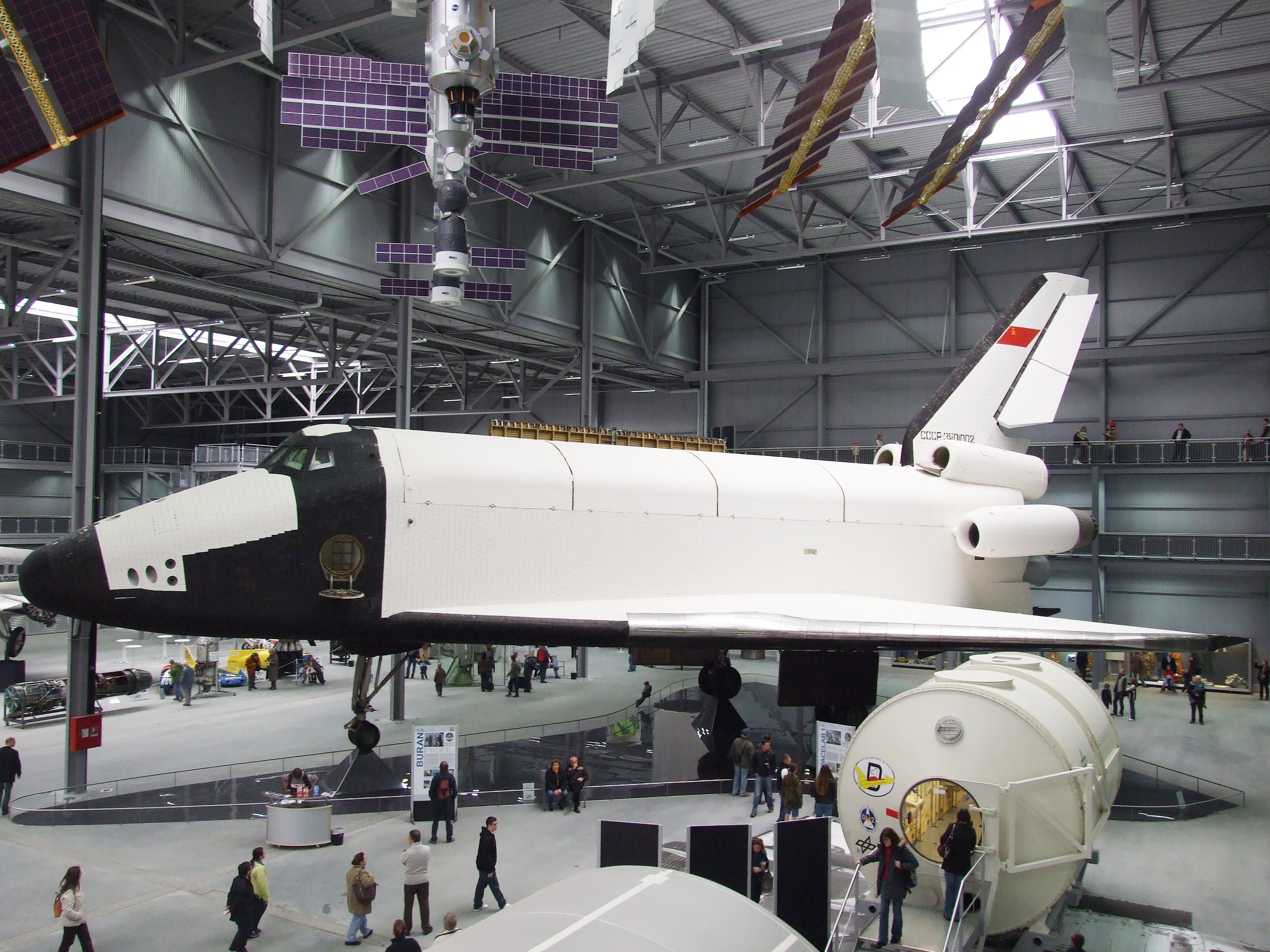 OK-GLI (Buran Analog BST-02) in Technik Museum Speyer taken in 2008